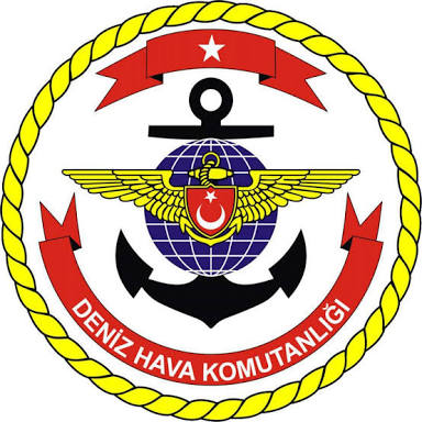 Deniz Hava Komutanlığı arması